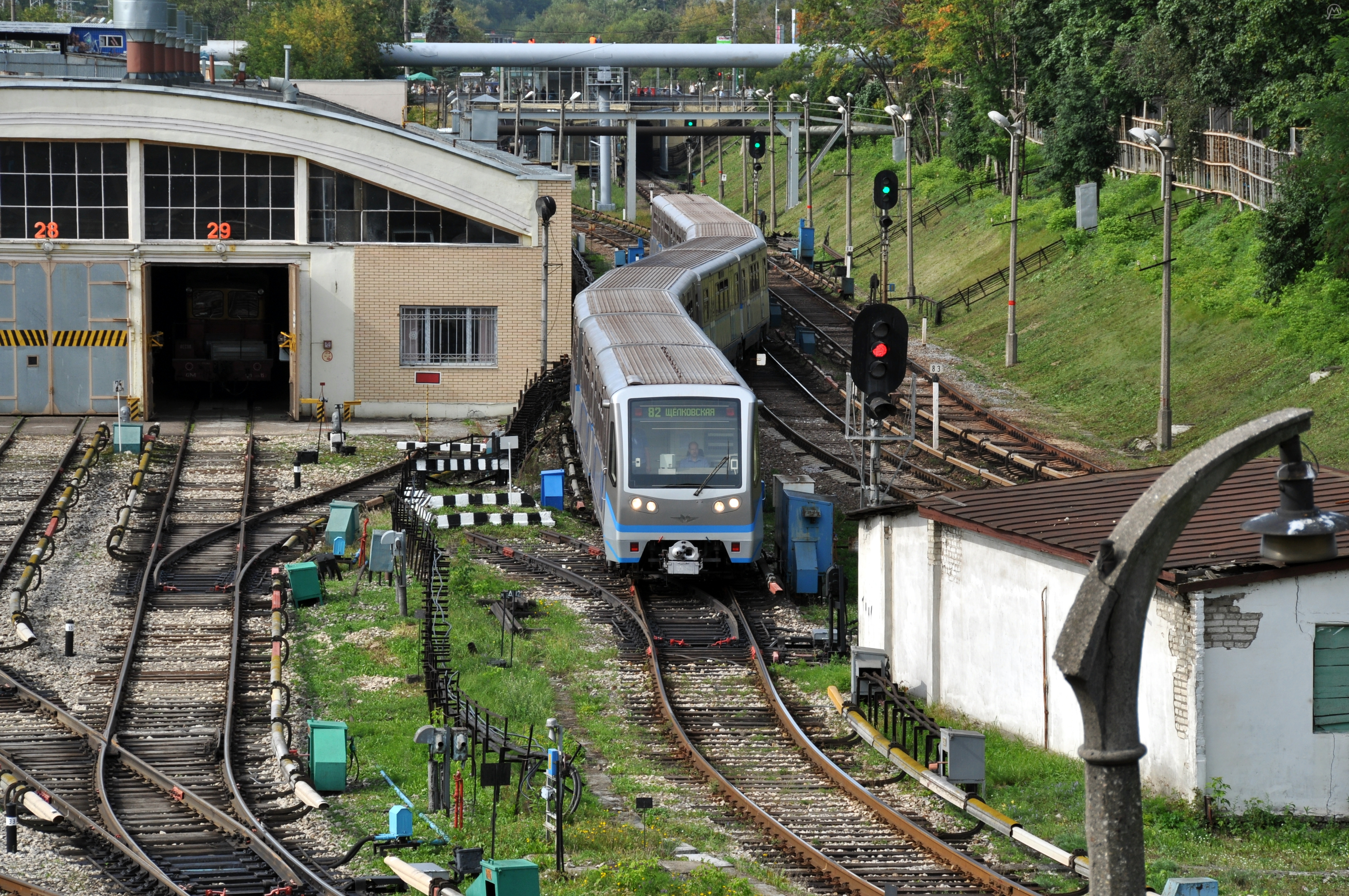 Электропоезд 81-740/741 Русич в электродепо Фили Московского метрополитена. Общий вид.